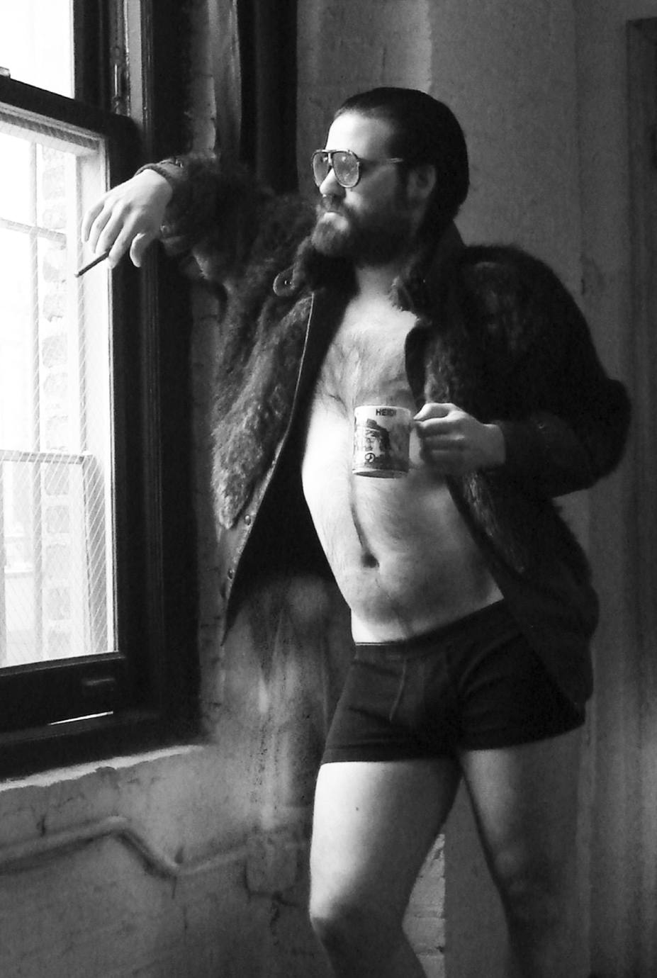 Foto del dibujante de cómics Benjamin Marra.